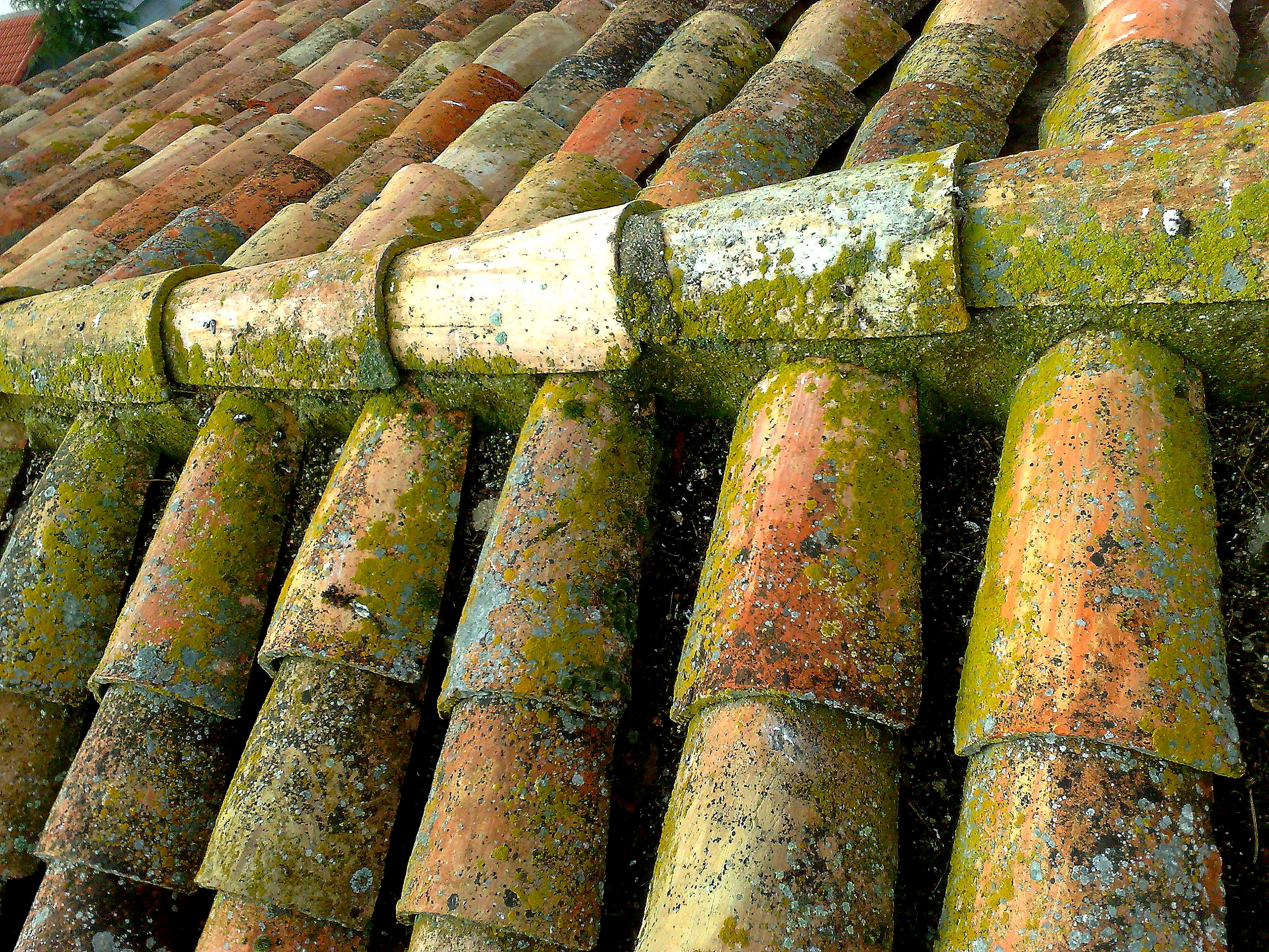 Dachziegel, Rumänien.